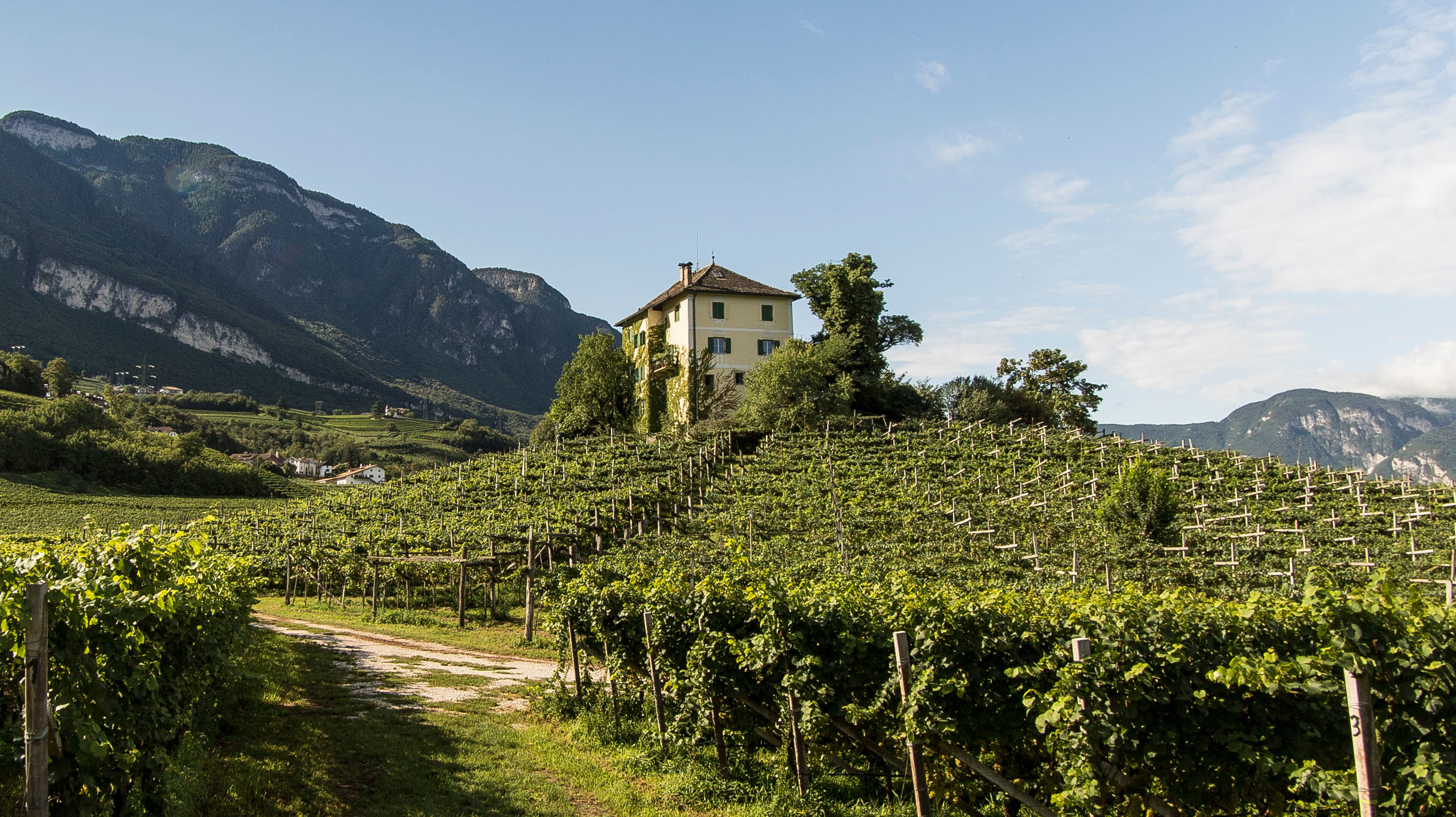 Das Villnerschlössl bzw. Viller Schlössl in Neumarkt in Südtirol